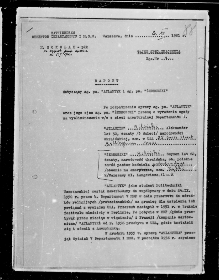 Szymon Biliński "Żebrowski"